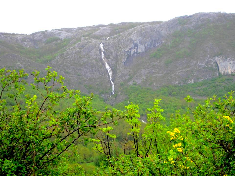 Ријека Опачица у Дабарском пољу. Аутор слике Умљанин.